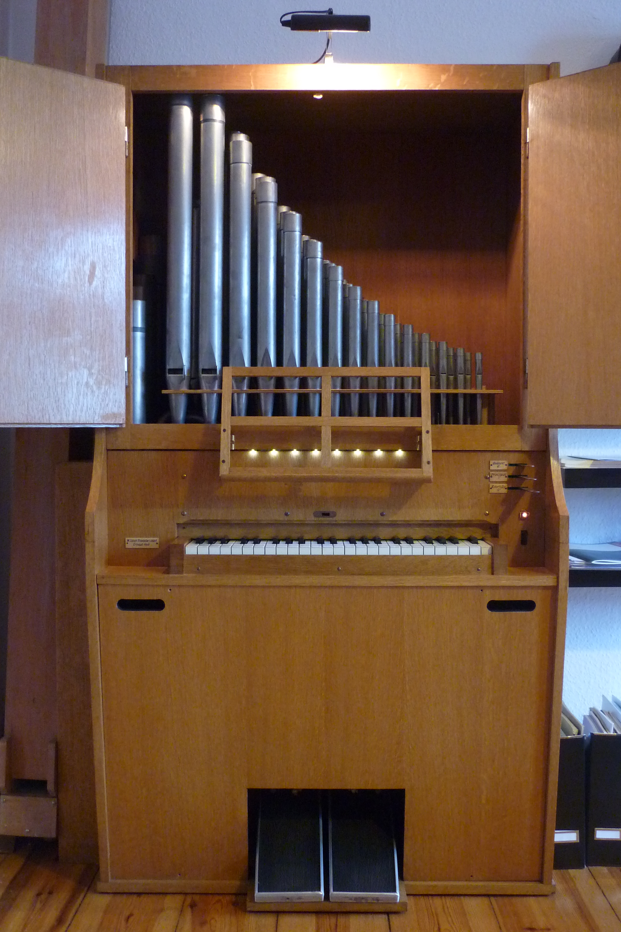 Orgelpositiv W. Sauer Orgelbau. 1 Manual. 3 Register: Gedeckt 8', Rohrflöte 4', Prinzipal 2'.